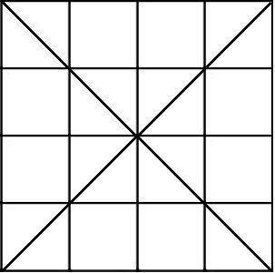 虎棋棋盤的一種。